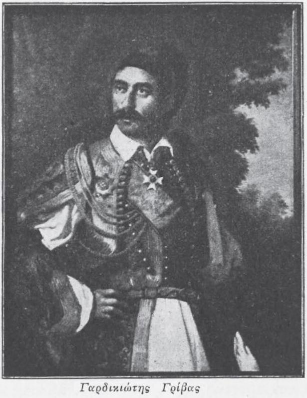 griechischer Freiheitskämpfer, 1821